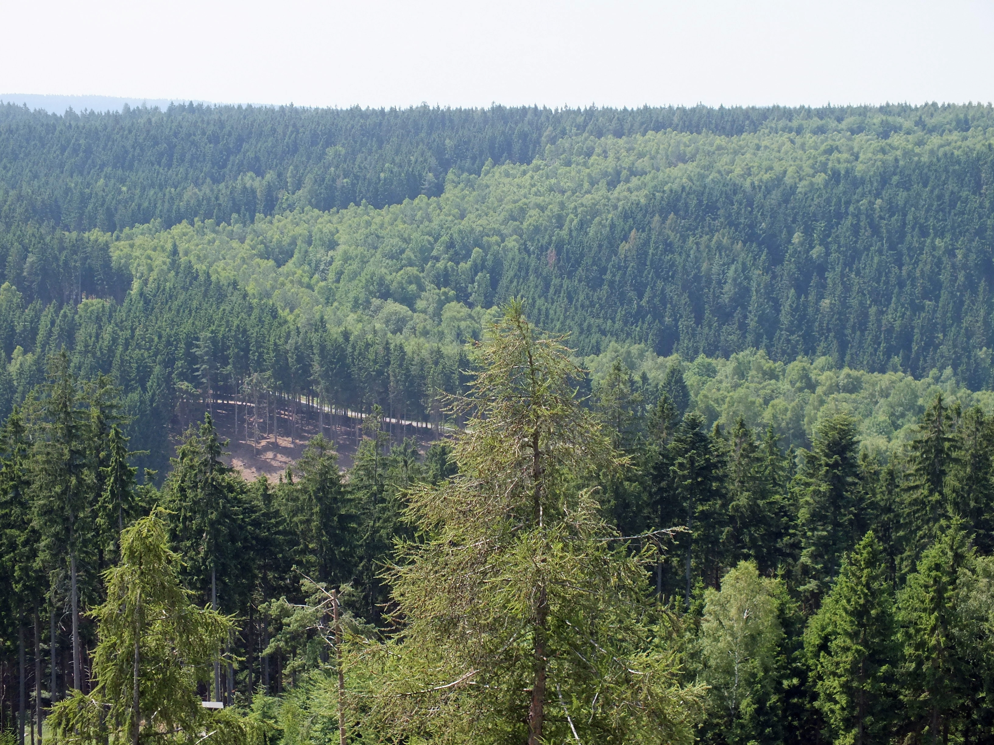 Der ehemalige Verlauf der innerdeutschen Grenze von der Thüringer Warte gesehen, zu erkennen als helleres Laubwaldband